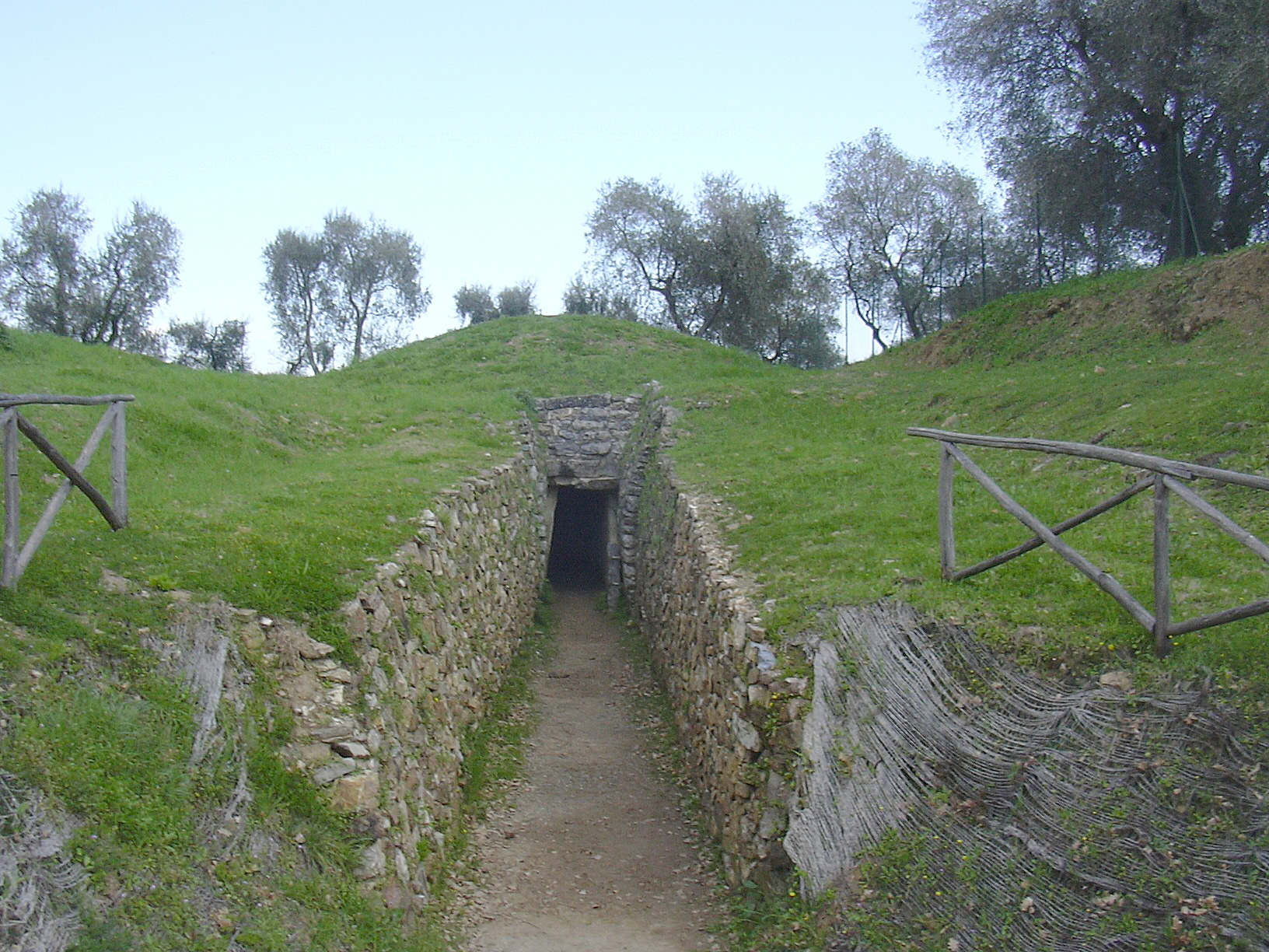 Etruscan tumulus ("Little Devil 2"), Vetulonia/Tuscany, Italy